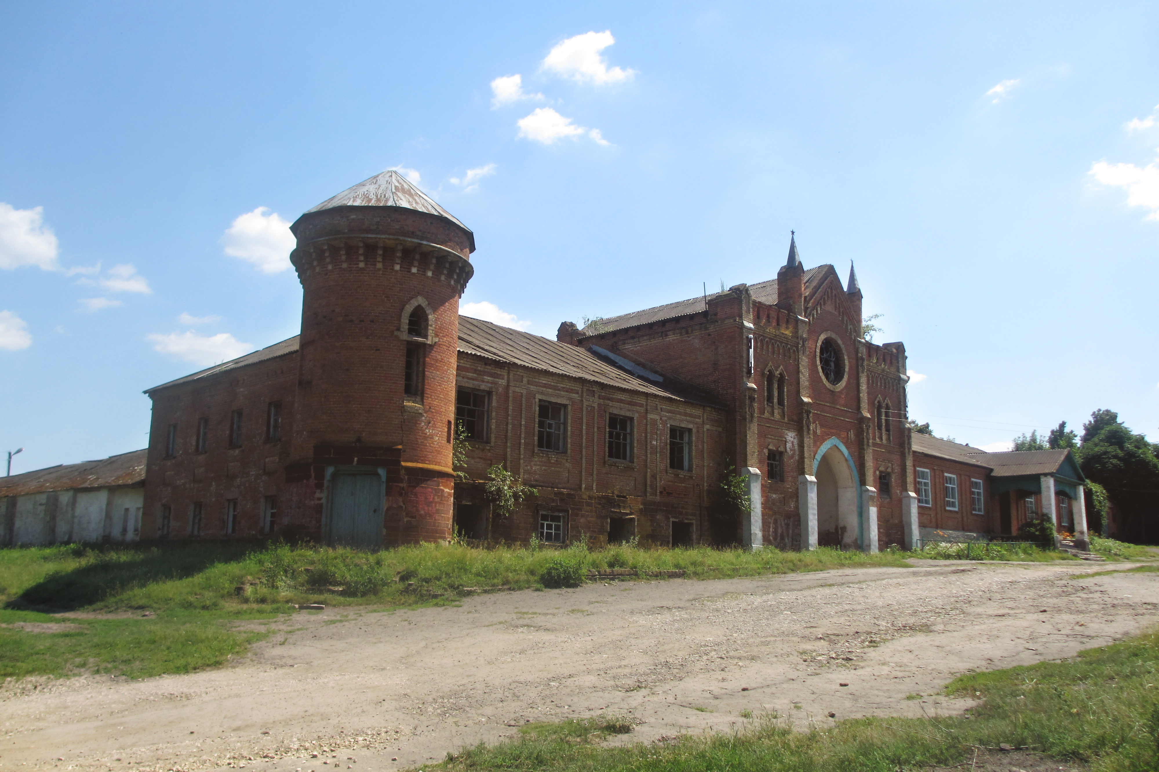 Охотников замок: Яковка (Сосновка), Колпнянский район, Орловская область